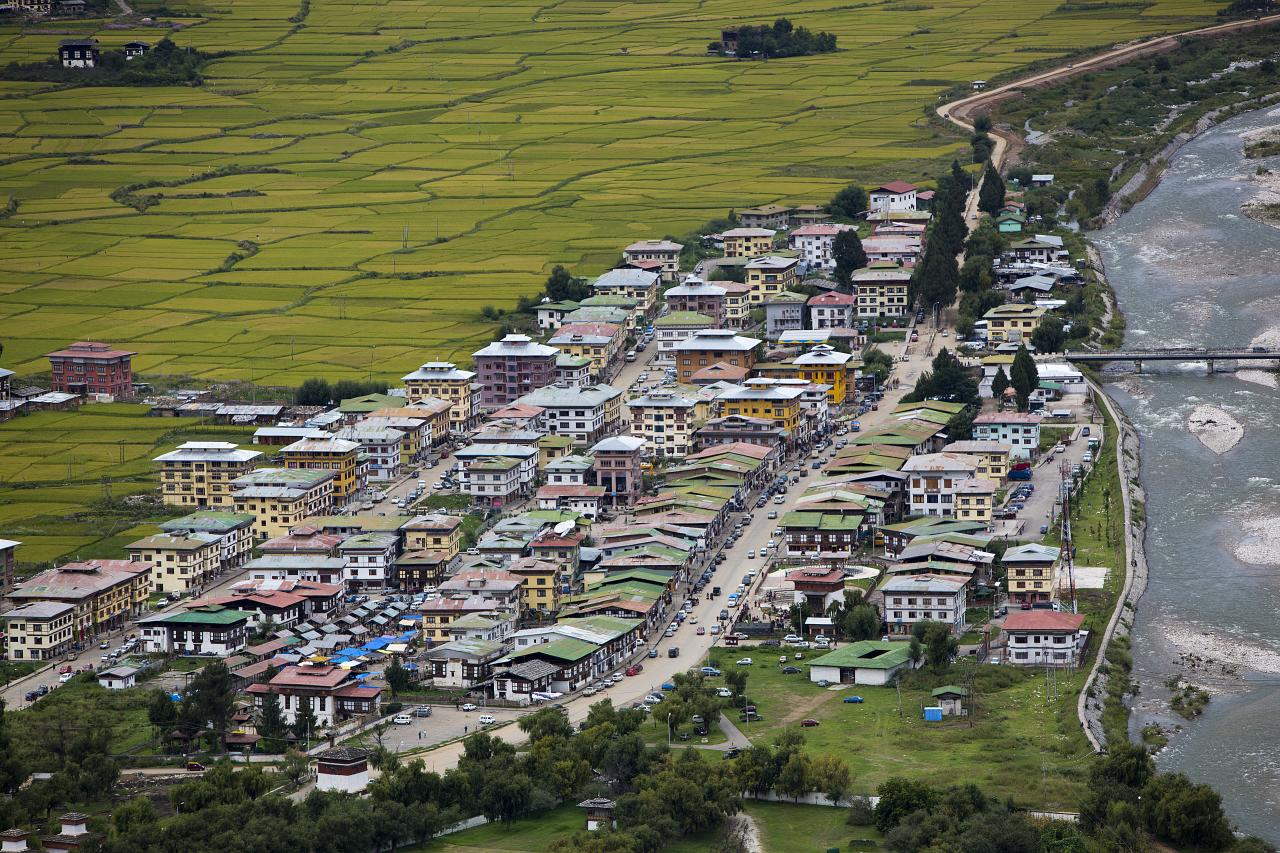 Bhutan